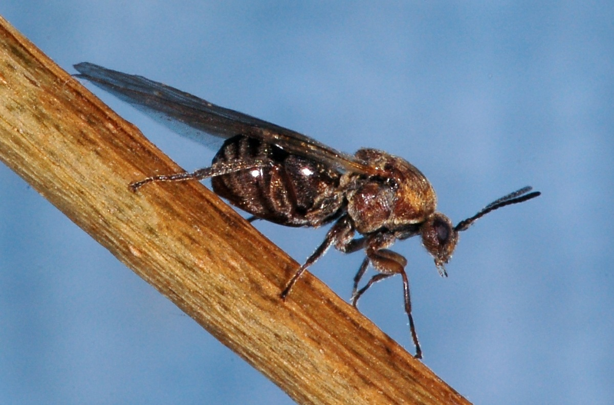 cf. Andricus coriarius (leg. G. Schadewaldt) an Quercus robur, Wiesbaden, Hessen, Deutschland